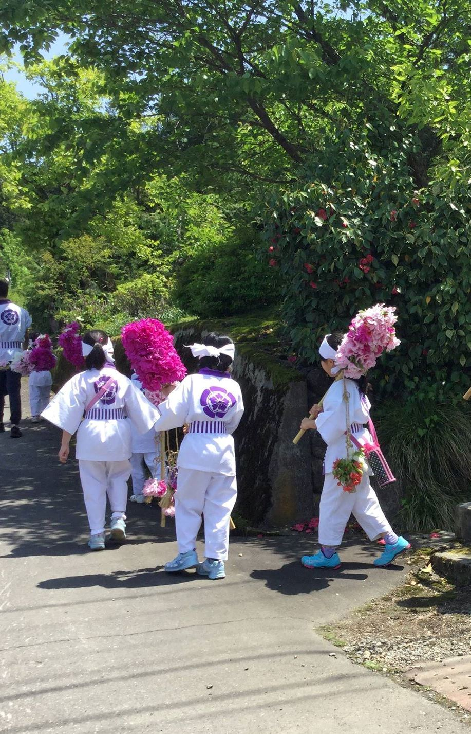 花山行事にて歩く子どもたち